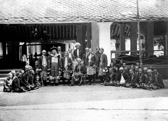 Negatief. Het inheems bestuur van Bangil, Pasoeroean in vol ornaat, inclusief vertegenwoordigers van de Arabische en Chinese gemeenschap